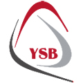 logo Young Silver Band, ontwerp: J. Seys